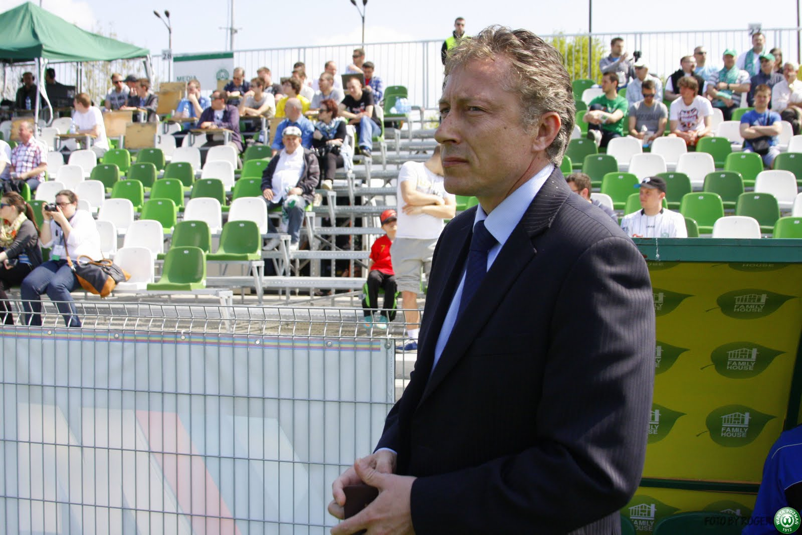 Ryszard Tarasiewicz jako trener Zawiszy Bydgoszcz.